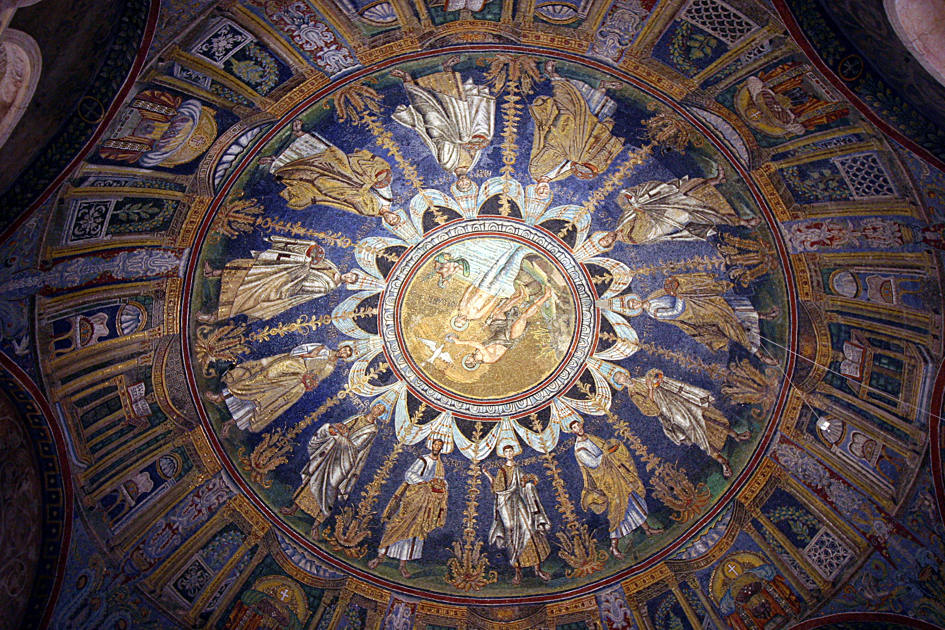 Baptistry of Neon (Ravenna) - Mosaics